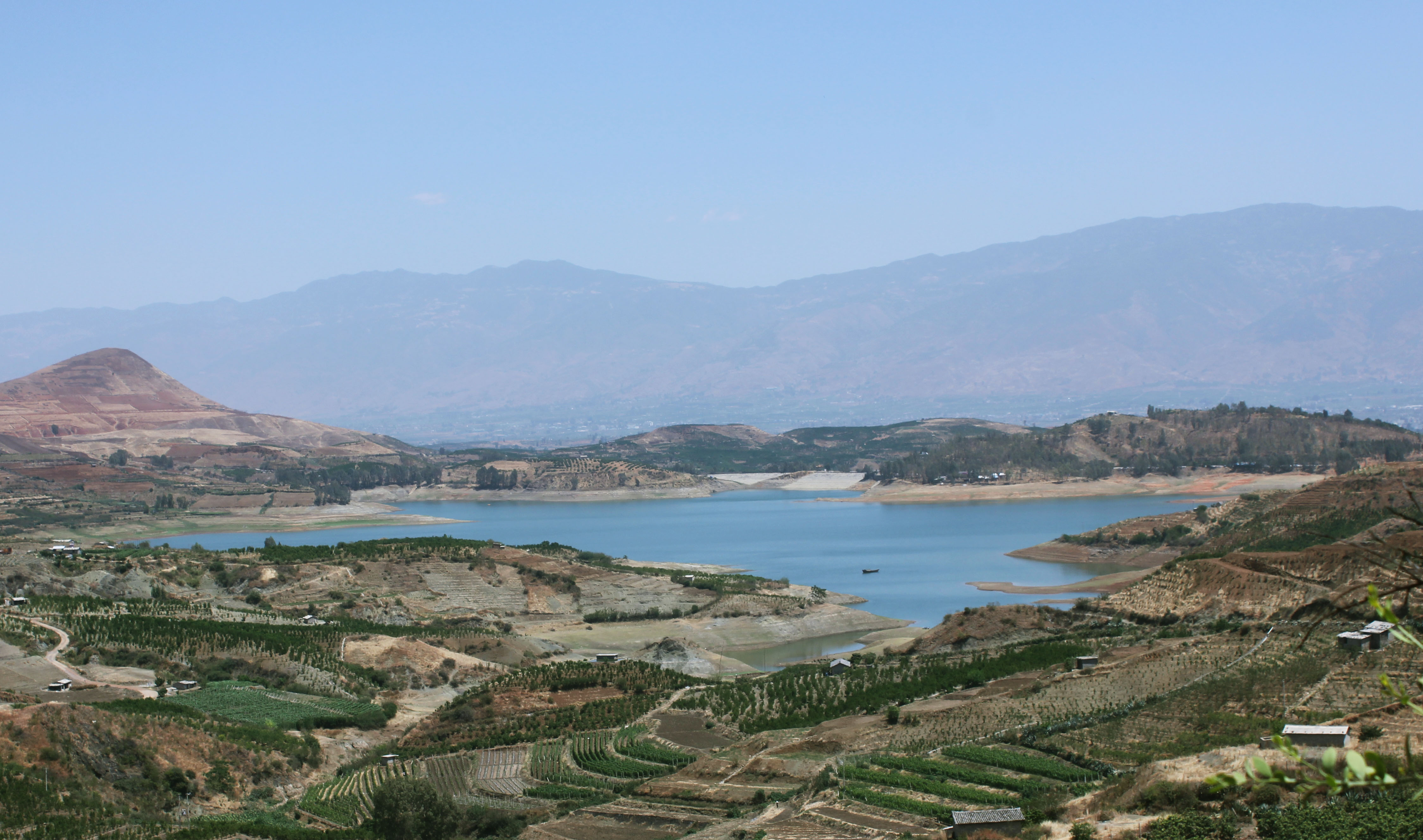 云南省宾川县大银甸水库，面向东方。